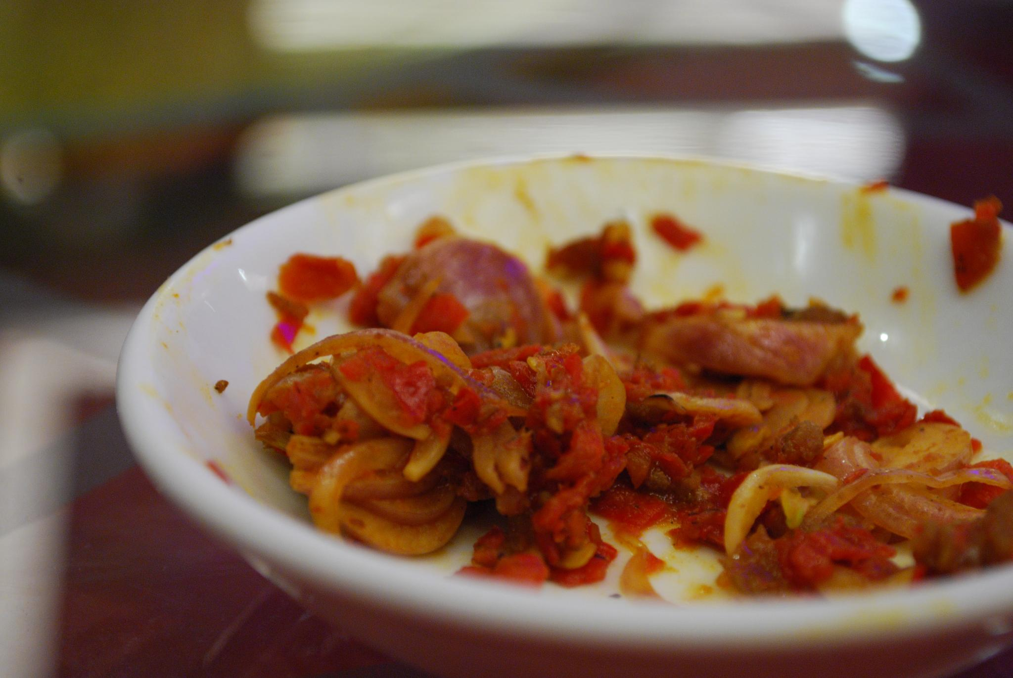 Cincalok Yummy food! 文华轩大饭店 Restoran Super Tanker Sdn Bhd Damansara Branch 48 SS 20/10 Damansara Kim 47400 Petaling Jaya Selangor TEL: 03-77267768 / 03-77267769 Bandar Utama Branch No 11, Persiaran Bukit Utama 47800 Bandar Utama Petaling Jaya Selangor Tel: 03-77268877 Fax: 0377286551 Reviews: - Restoran Extra Super Tanker - Juicy & Delicious - May 25, 2009 - Restoran Extra Super Tanker @ Damansara Kim, Petaling Jaya, Selangor - Malaysia Most Wanted Food - Restaurant Extra Super Tanker - TripAdvisor